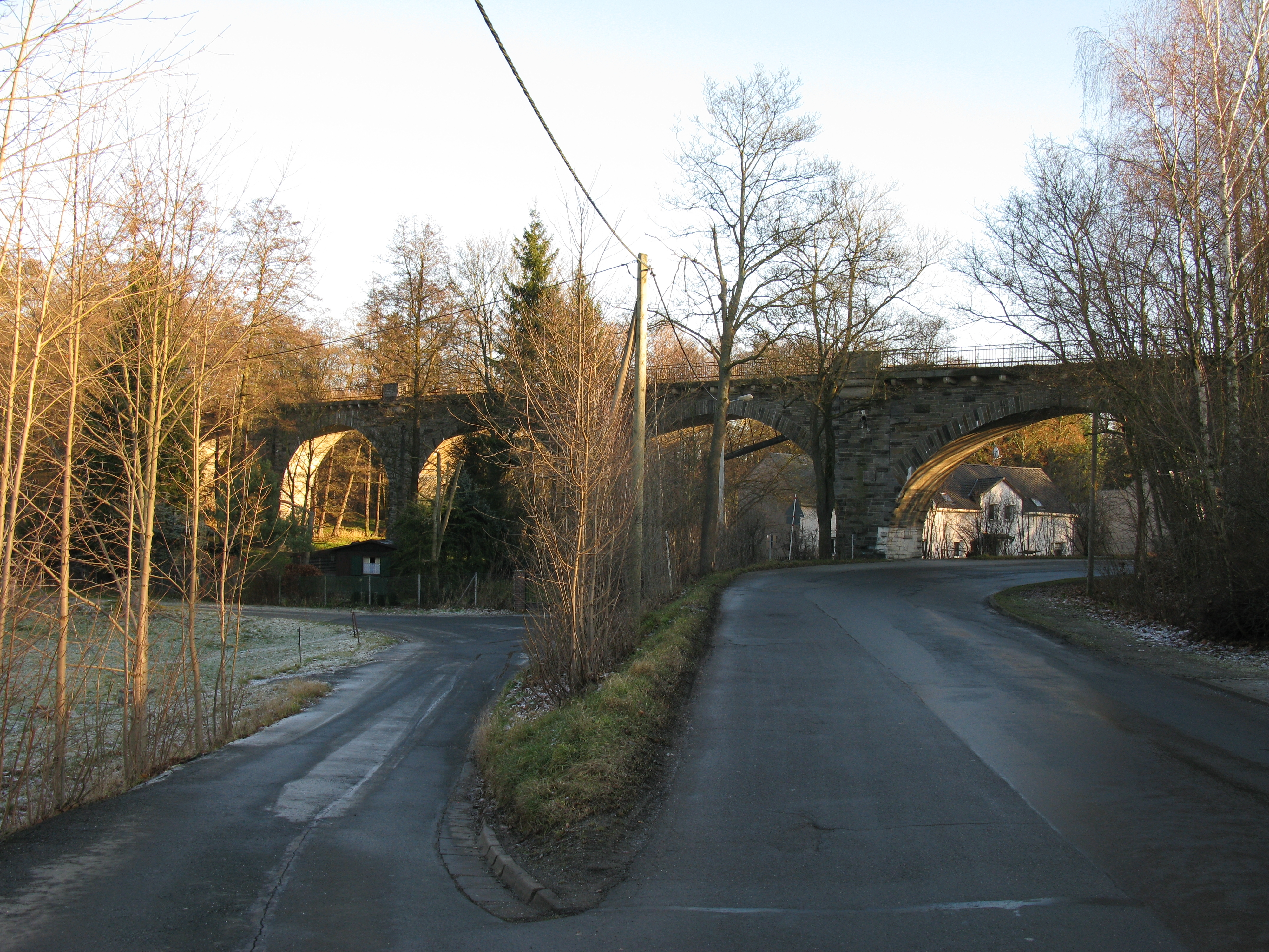 Denkmalgeschützte Brücke an der Falkensteiner Straße im Plauener, Stadtteil Kleinfriesen